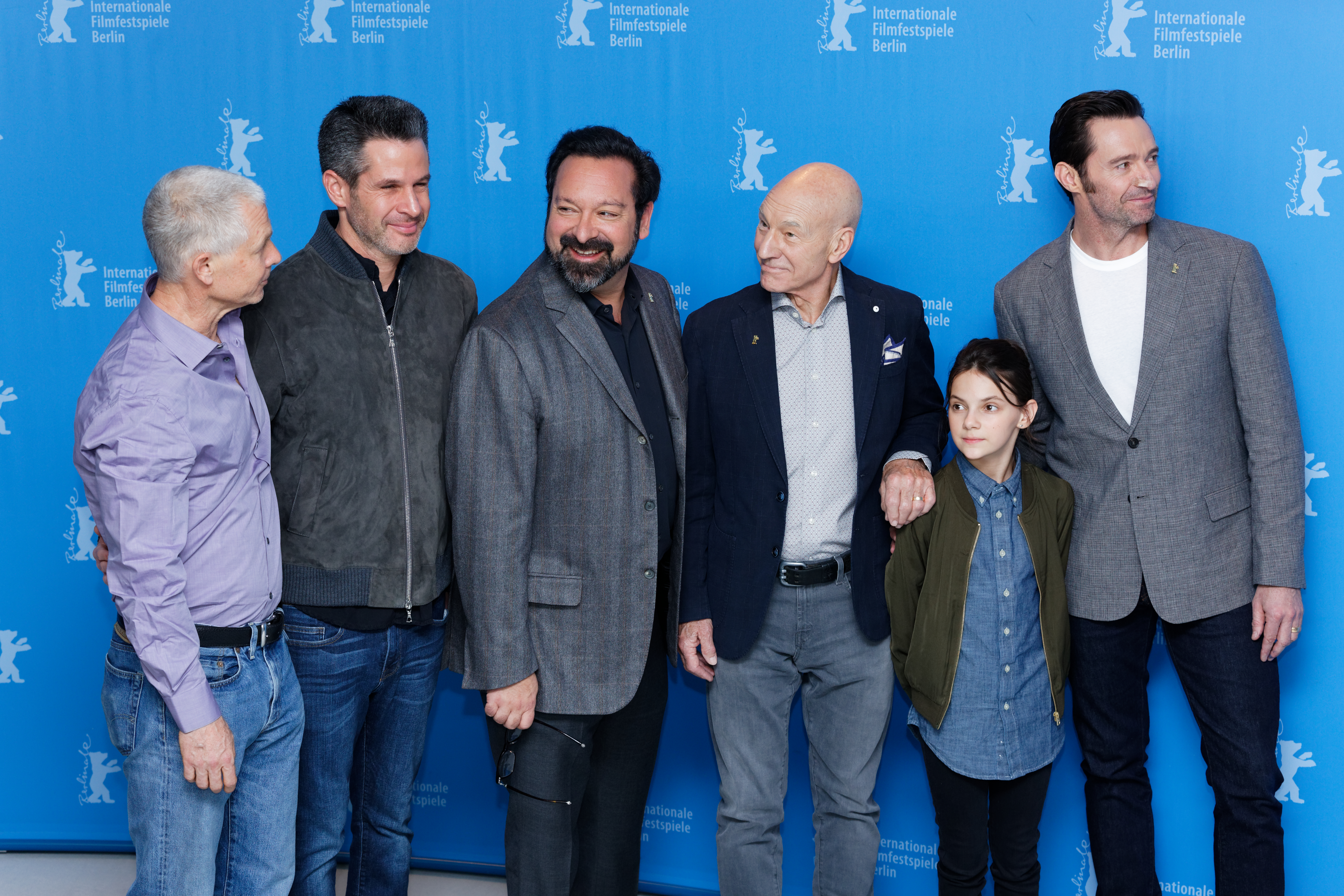 Cast & Crew beim Photo Call zu Logan bei der Berlinale 2017